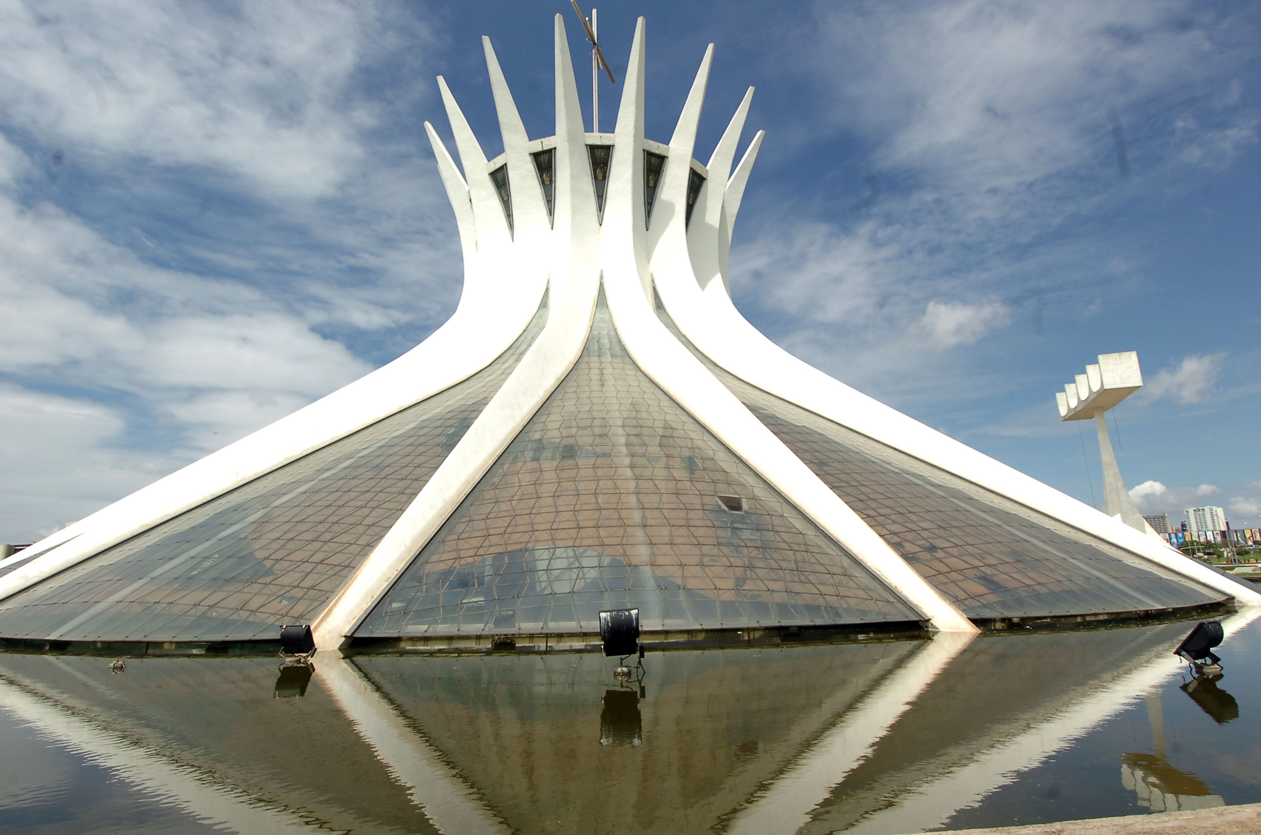 Imagem de Brasília